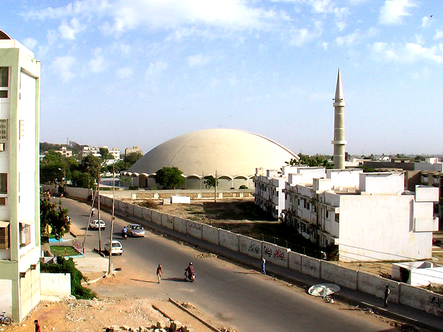 Masjid e Tooba in Karachi